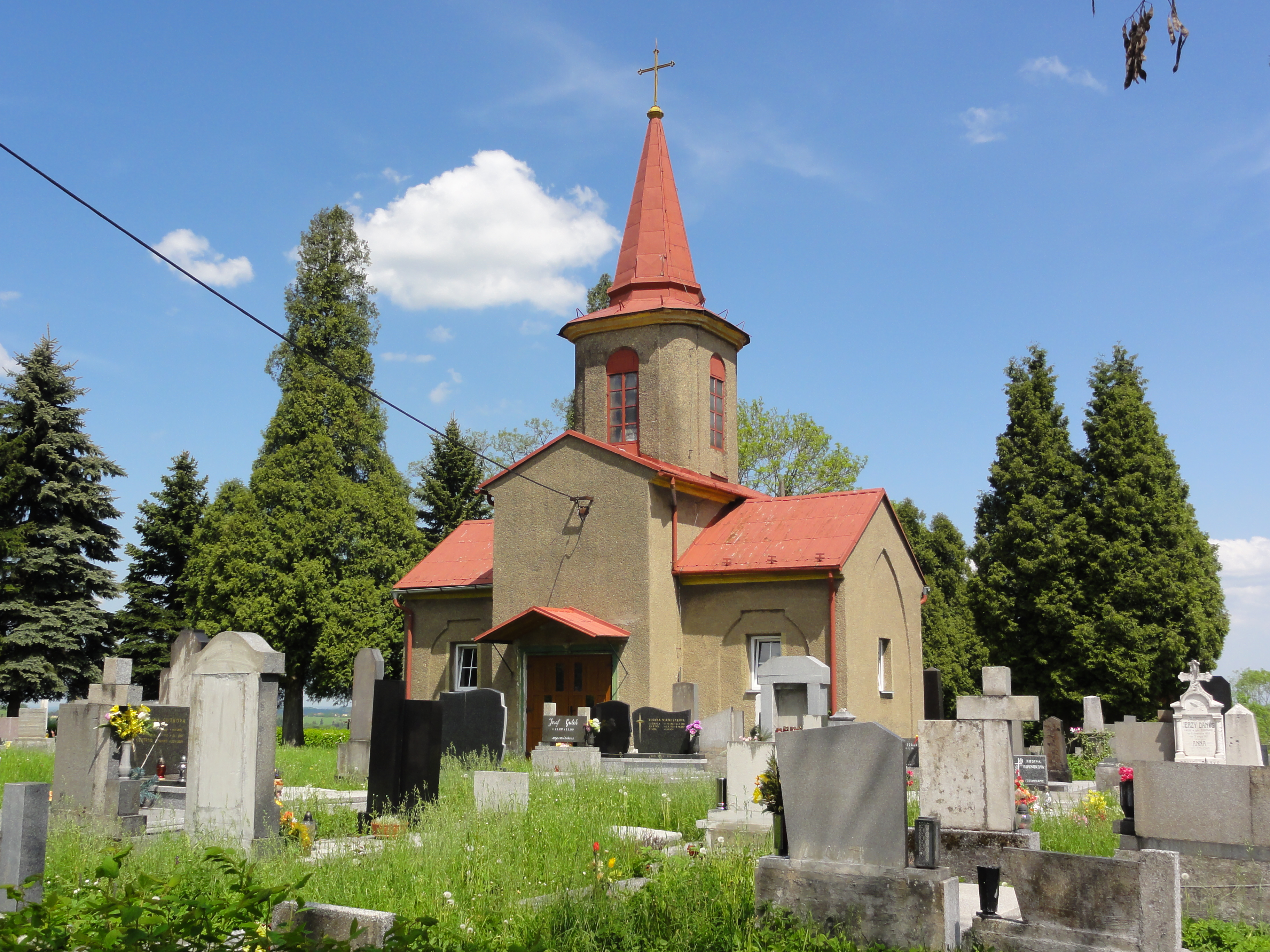 Czeski Cieszyn, Górny Żuków, kaplica ewangelicka